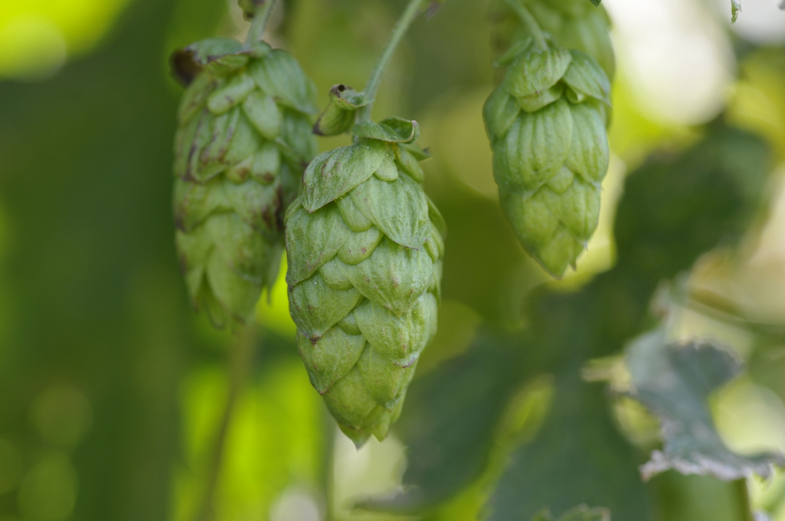 Hopfenfrucht